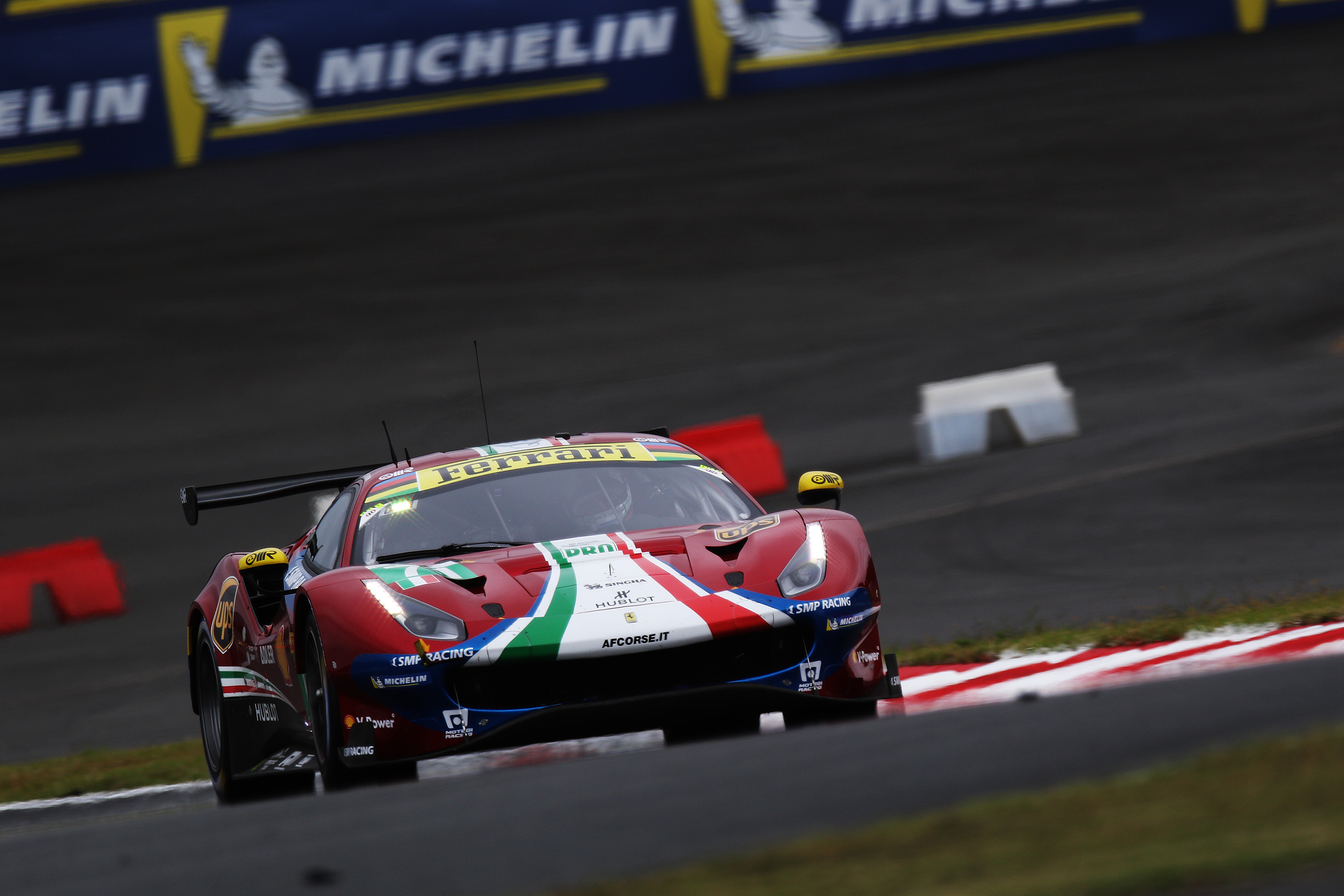 2018 6 Hours of Fuji.